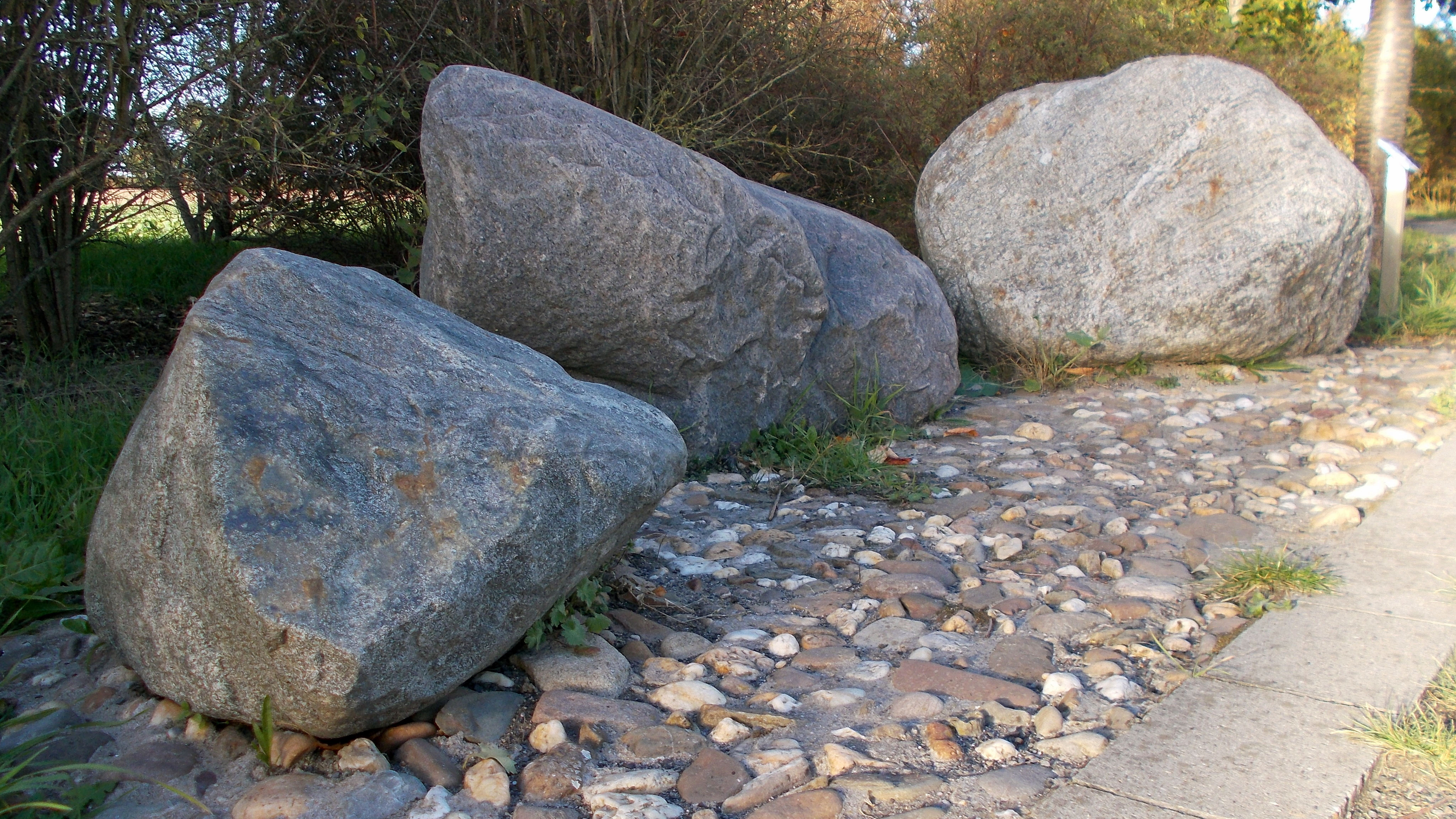 Findlingsweg Sonsbeck Station 10: Gneis (Findlinge aus Skandinavien).